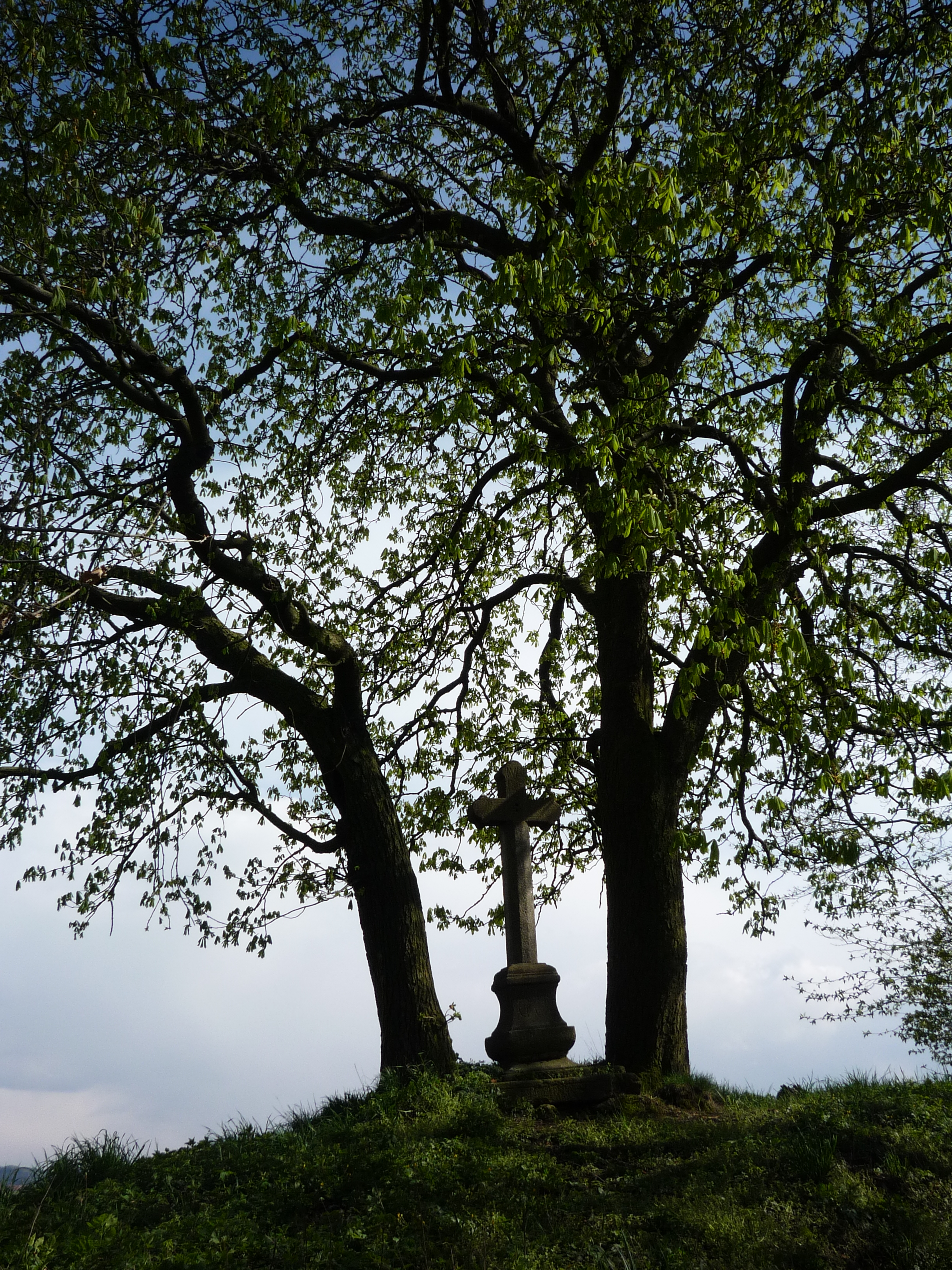 Autor fotografie Jiří Zelenka. Křížek za křižovatkou ulice U Vítků a polní cesty. Havlíčkův Brod